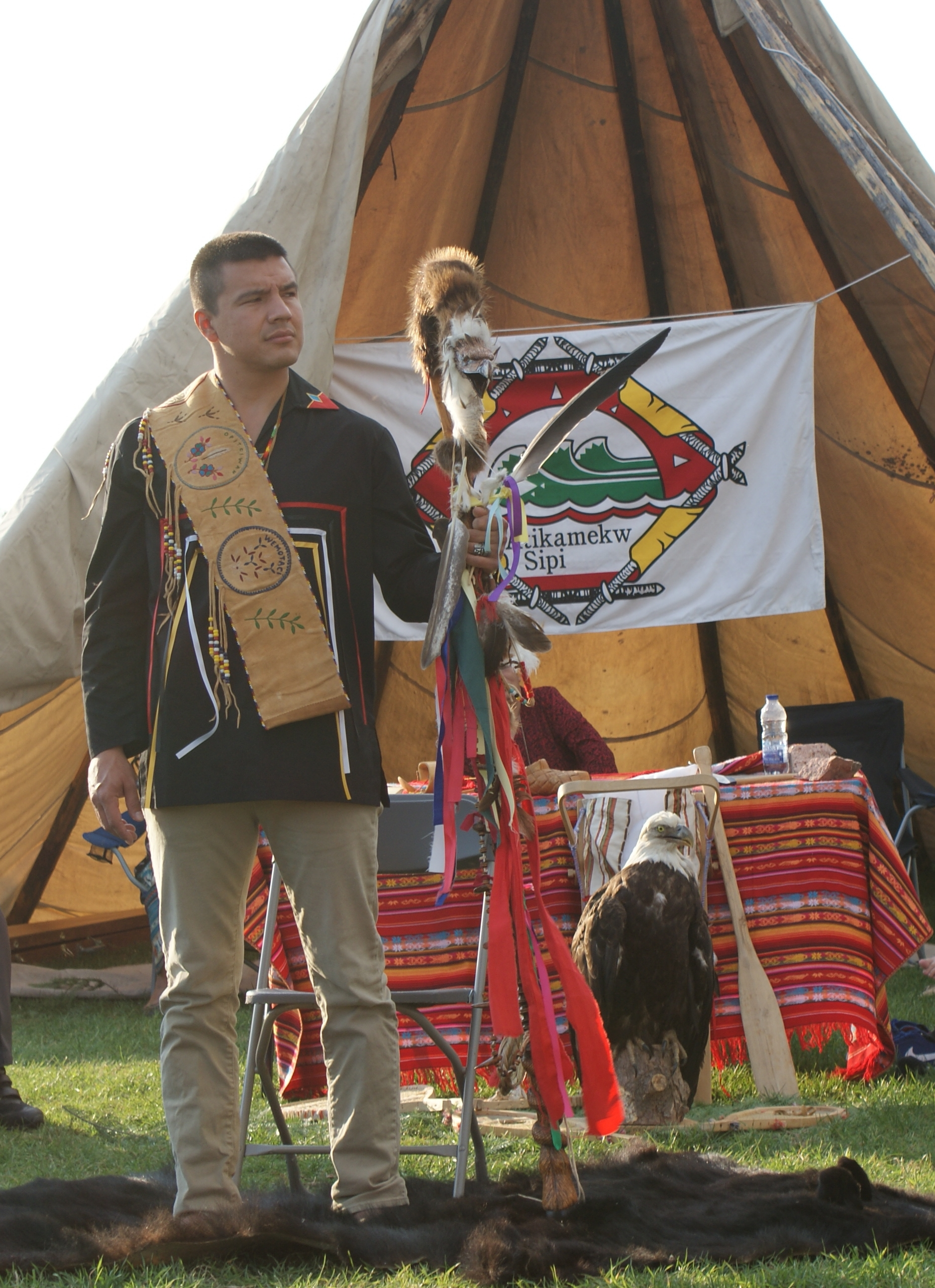 Jour d'assermentation de Constant Awashish